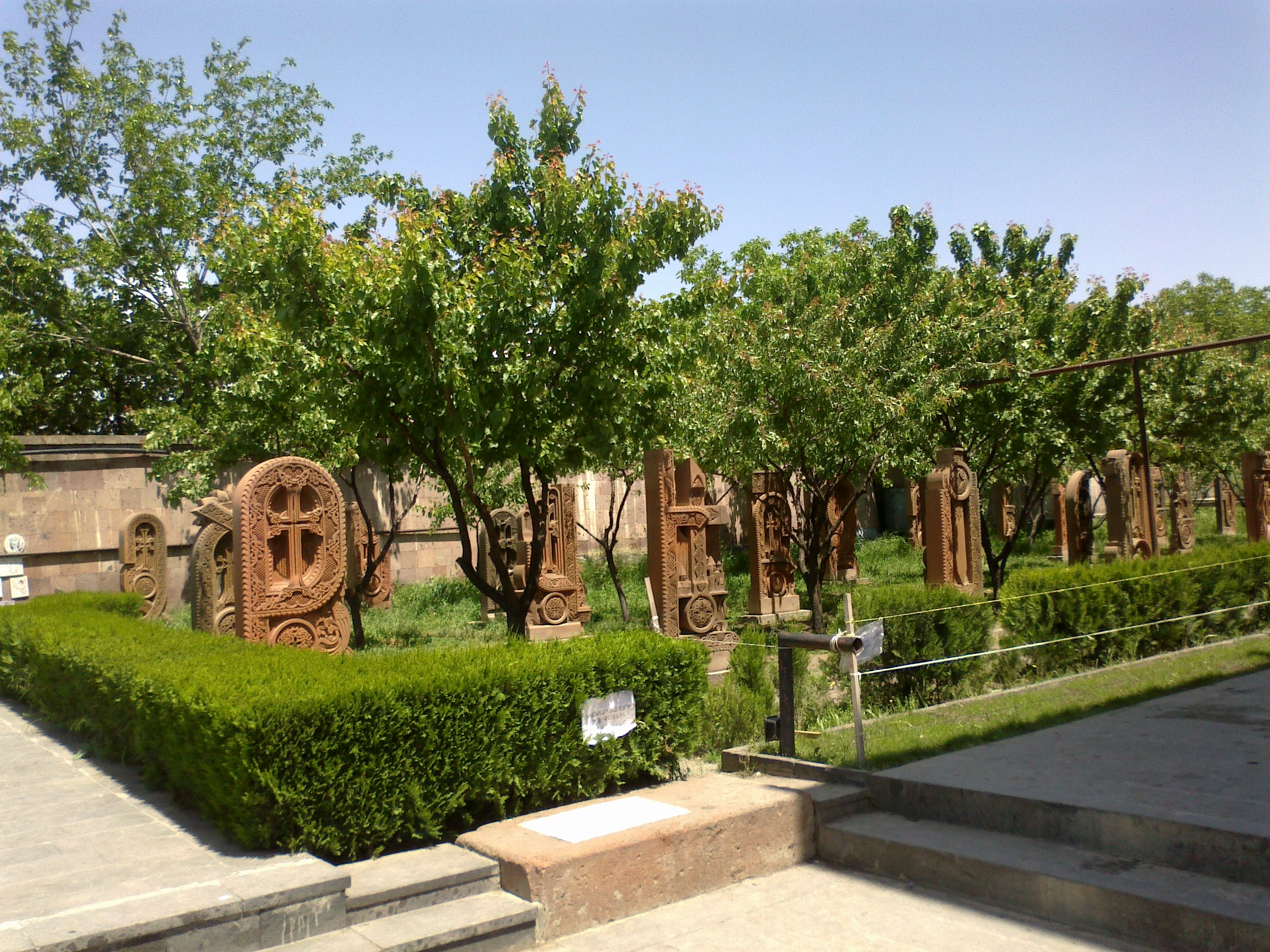 Եկեղեցի Մեսրոպ Մաշտոց, գ. Օշական 113/22